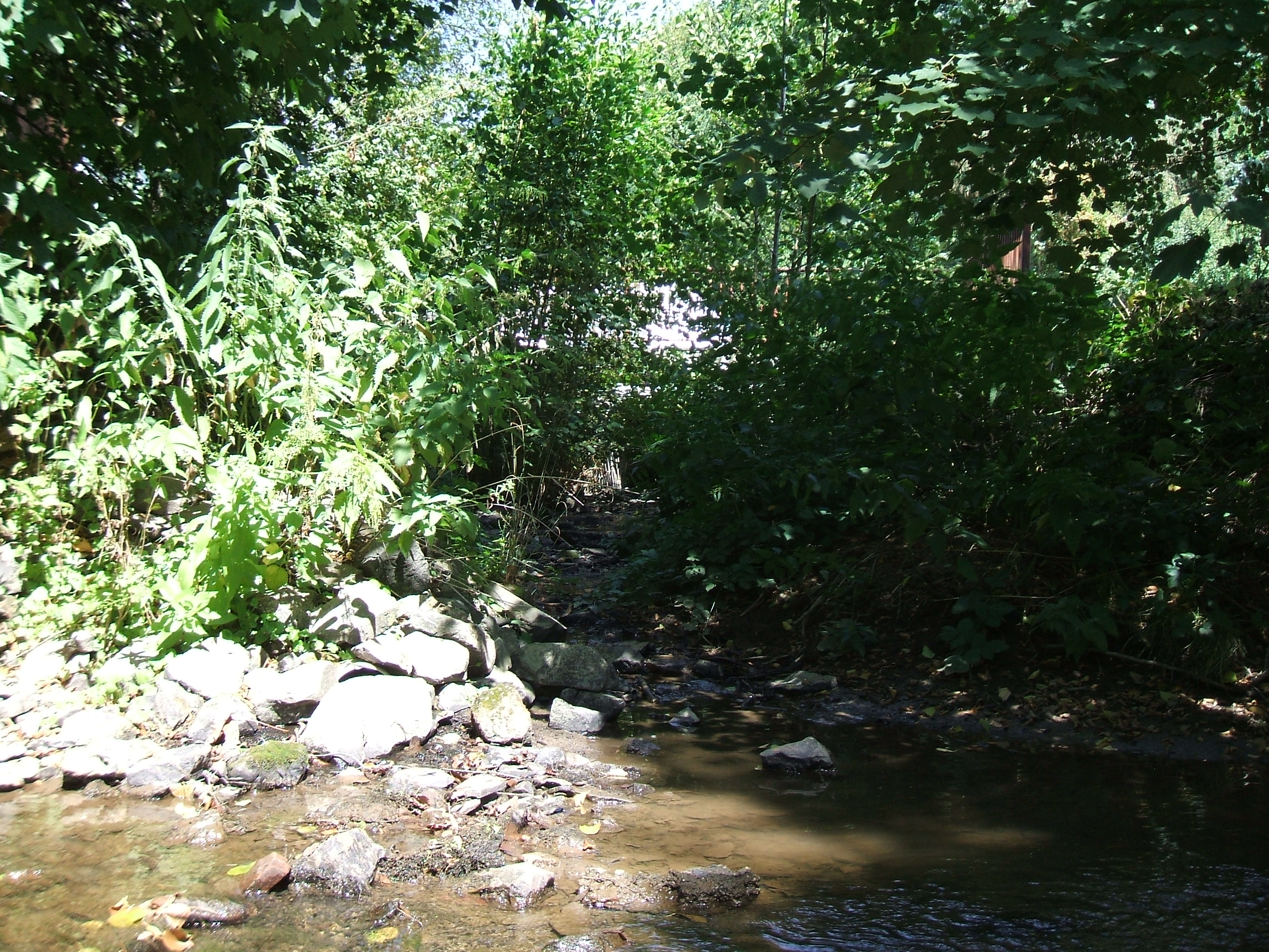 Linkssseitige Einmündung des Forbachs (von hinten, unter einer Brücke unter der B 275 hindurch kommend) in die Usa (von links, Westen, kommend, nach rechts, Osten, abfließend) am westlichen Ortsrand von Langenhain-Ziegenberg